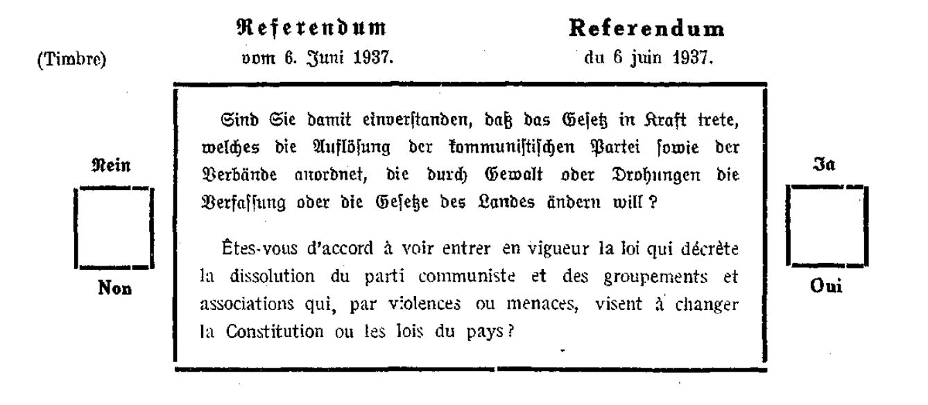 Referendum vum 6. Juni 1937